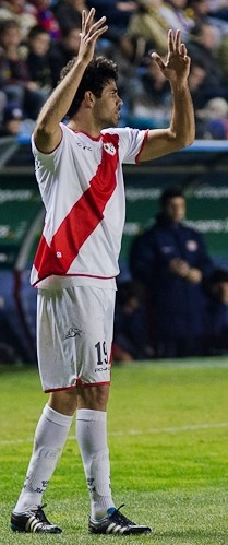 Levante - Rayo (D.Costa, Lass)